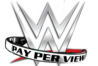 Логотип WWE Pay-Per - Wiew